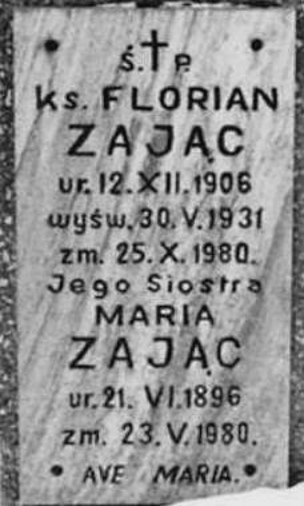 Tablica nagrobkowa ks. Floriana Zająca i jego siostry